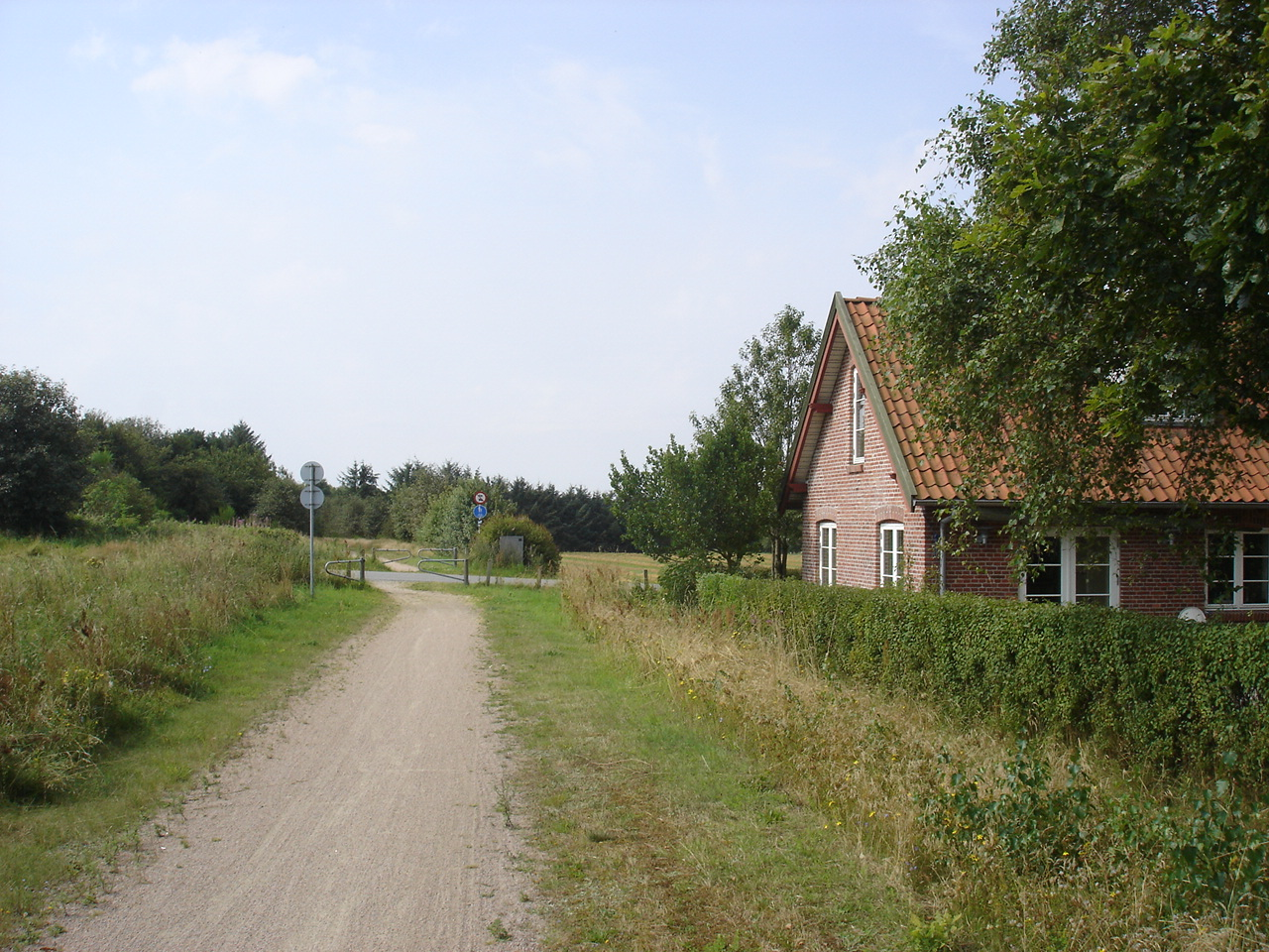 Salling Natursti krydser Grynderupvej - her lå Bysted trinbræt